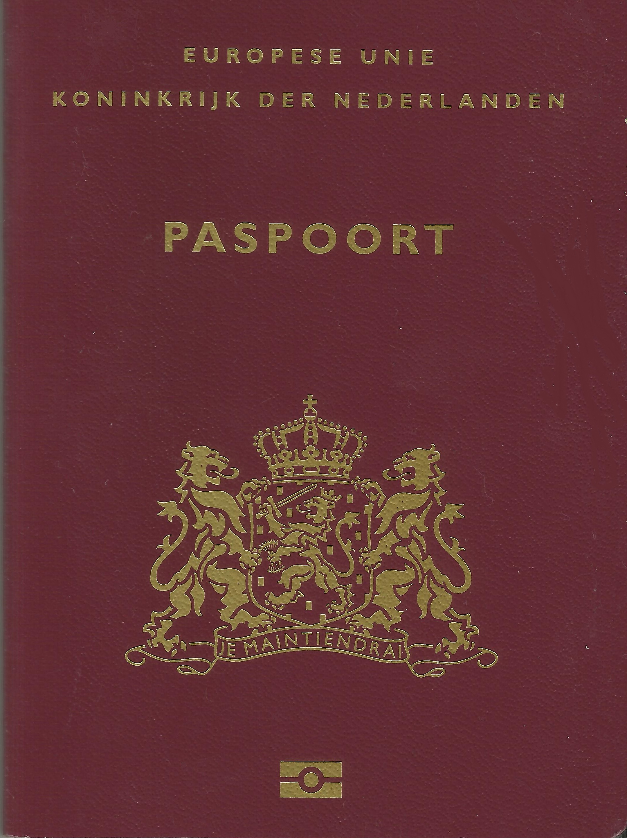 Nederlandse paspoort cover 2011